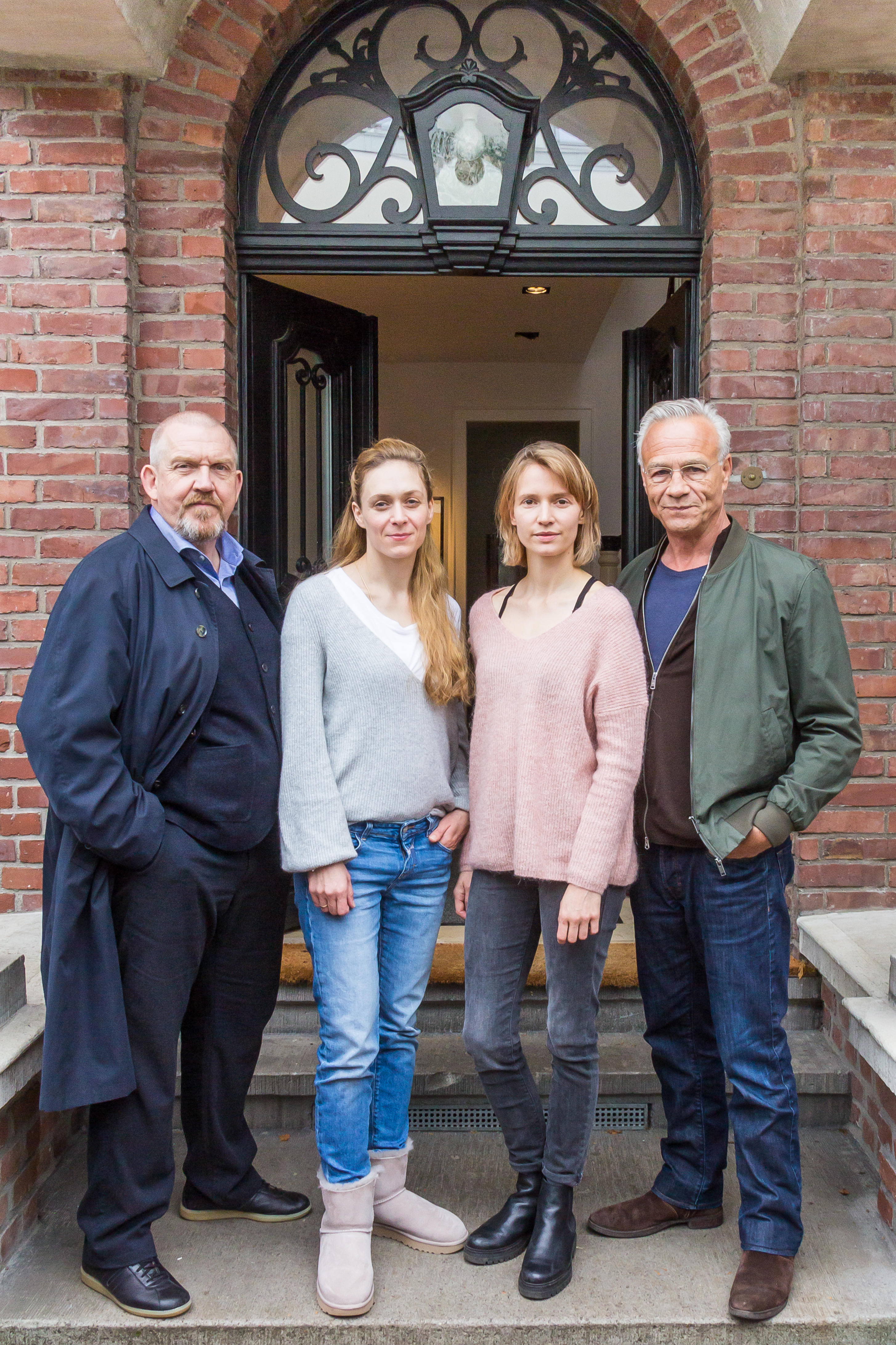 WDR-Dreharbeiten zu Tatort Köln „Gefangen“ Grppenfoto vor dem Drehort: Dietmar Bär in der Rolle des Kommissars Freddy Schenk Franziska Junge in der Rolle von Julia Freys Schwester Christine Weiss Frida-Lovisa Hamann in der Rolle der Borderline-Patientin Julia Frey Klaus J. Behrendt in der Rolle des Kommissars Max Ballauf